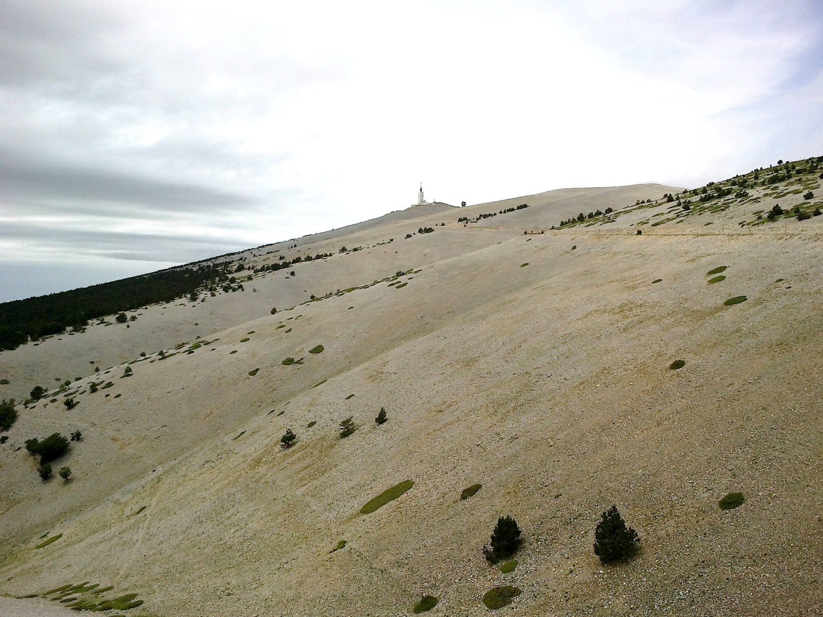 Vaucluse Mont Ventoux Montee Sud 07072014